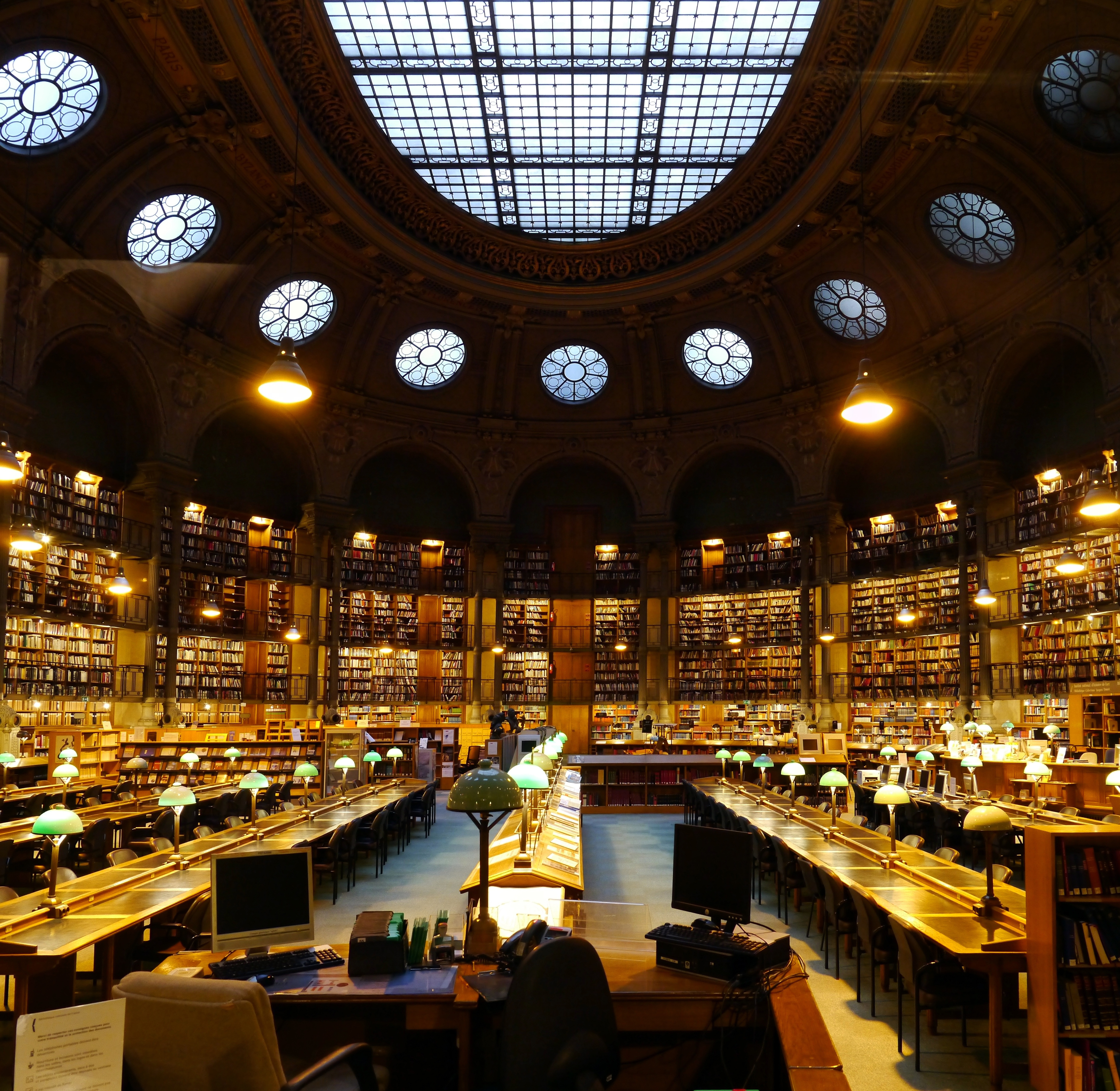 Bibliothèque nationale de France (site Richelieu), Paris - Salle Ovale.